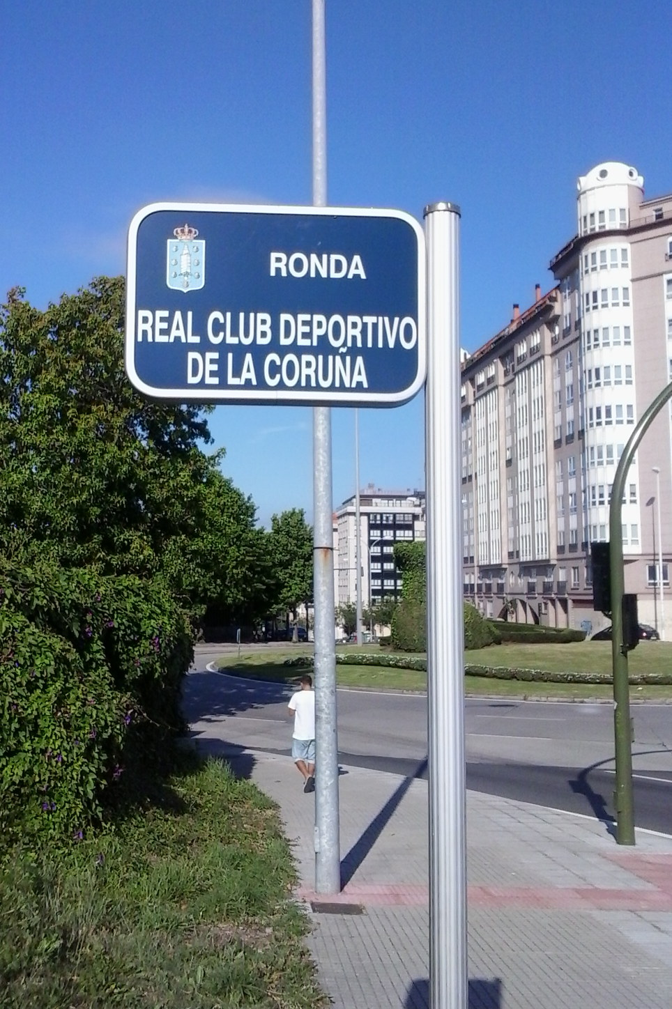 Cartel da terceira ronda na Coruña